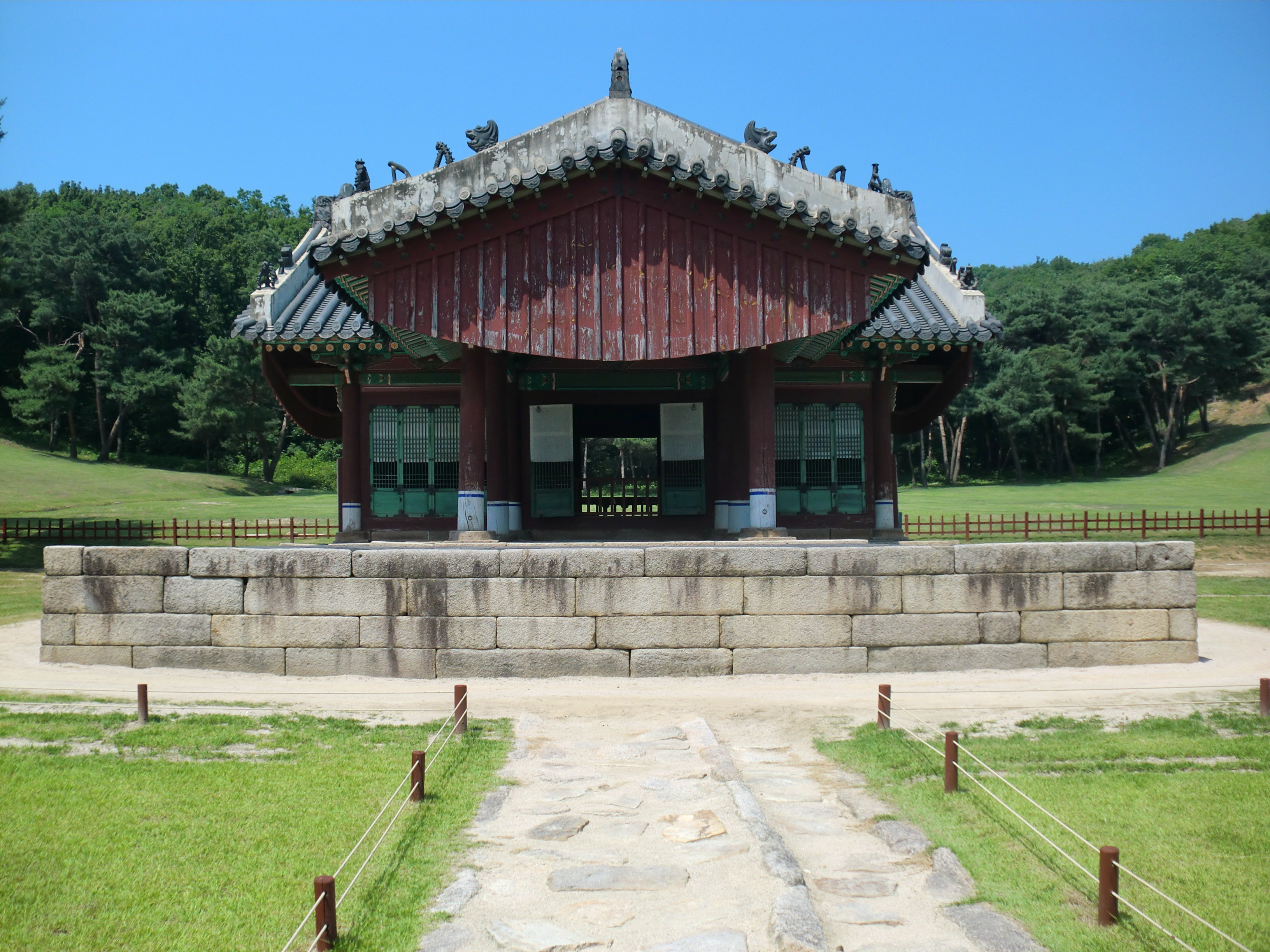 경기도 고양시에 있는 서오릉